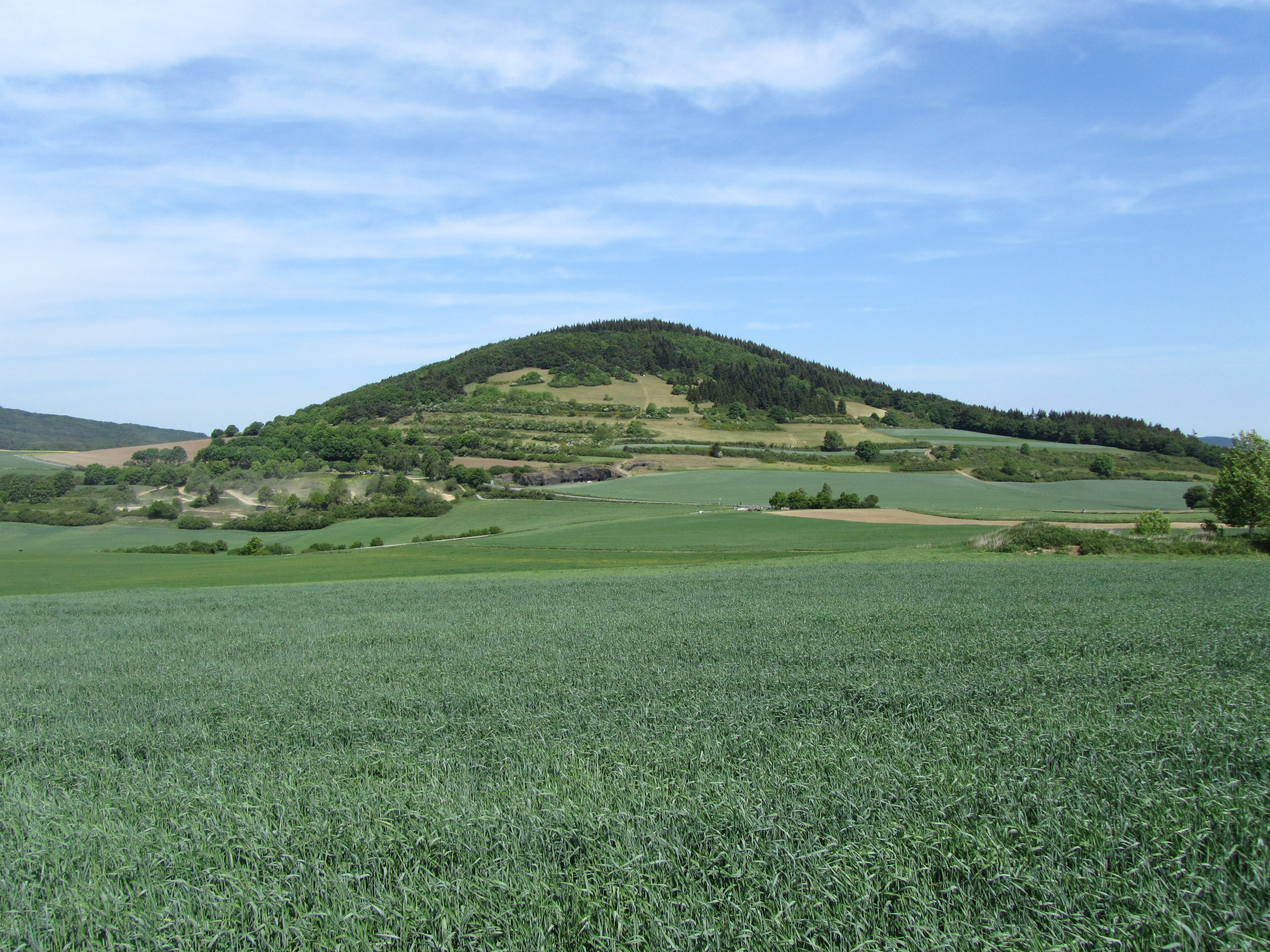 Der Hochstein aus Richtung Südsüdwest